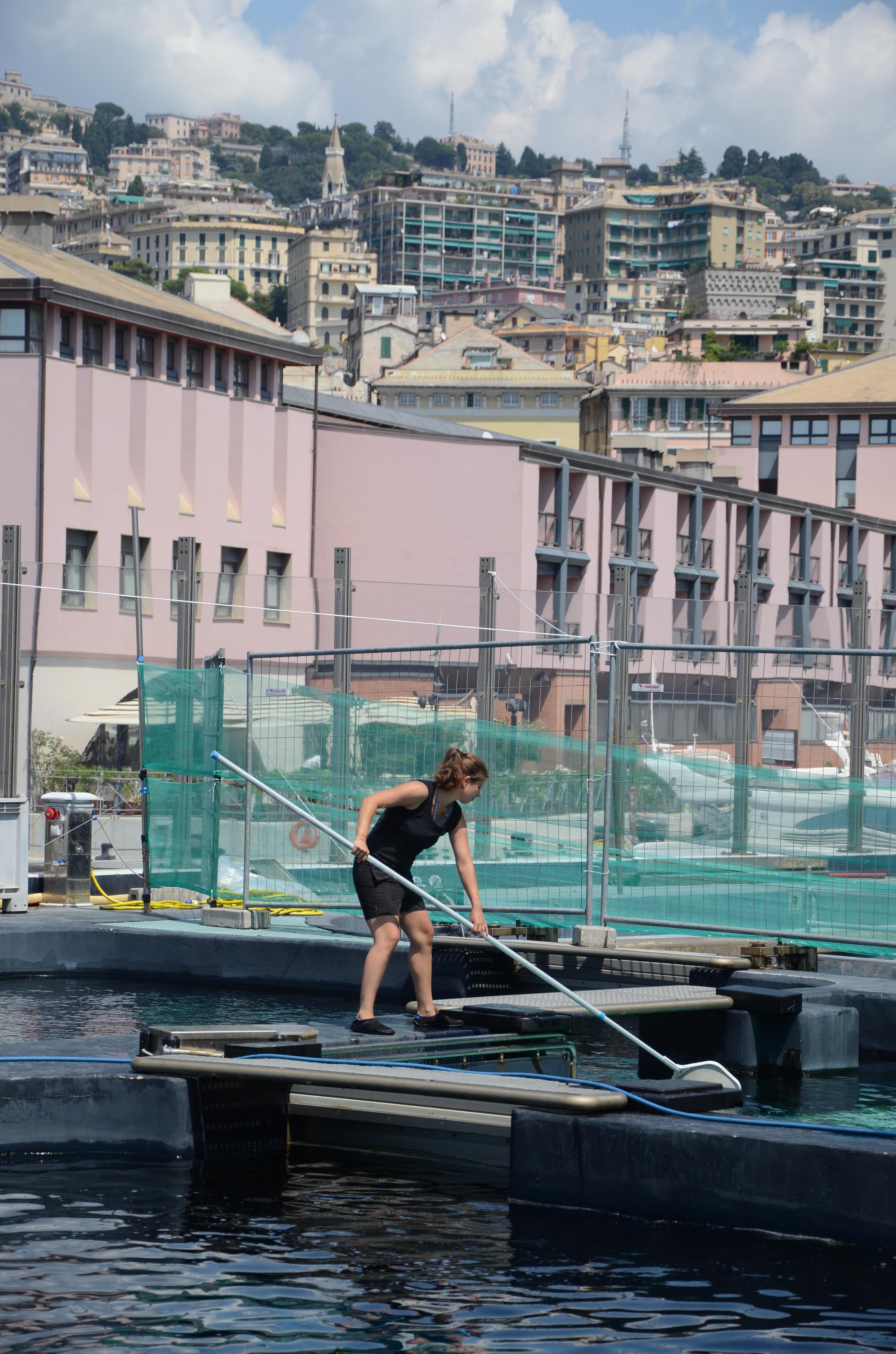 Dolfijnenverblijf van het aquarium van Genua, 2014.